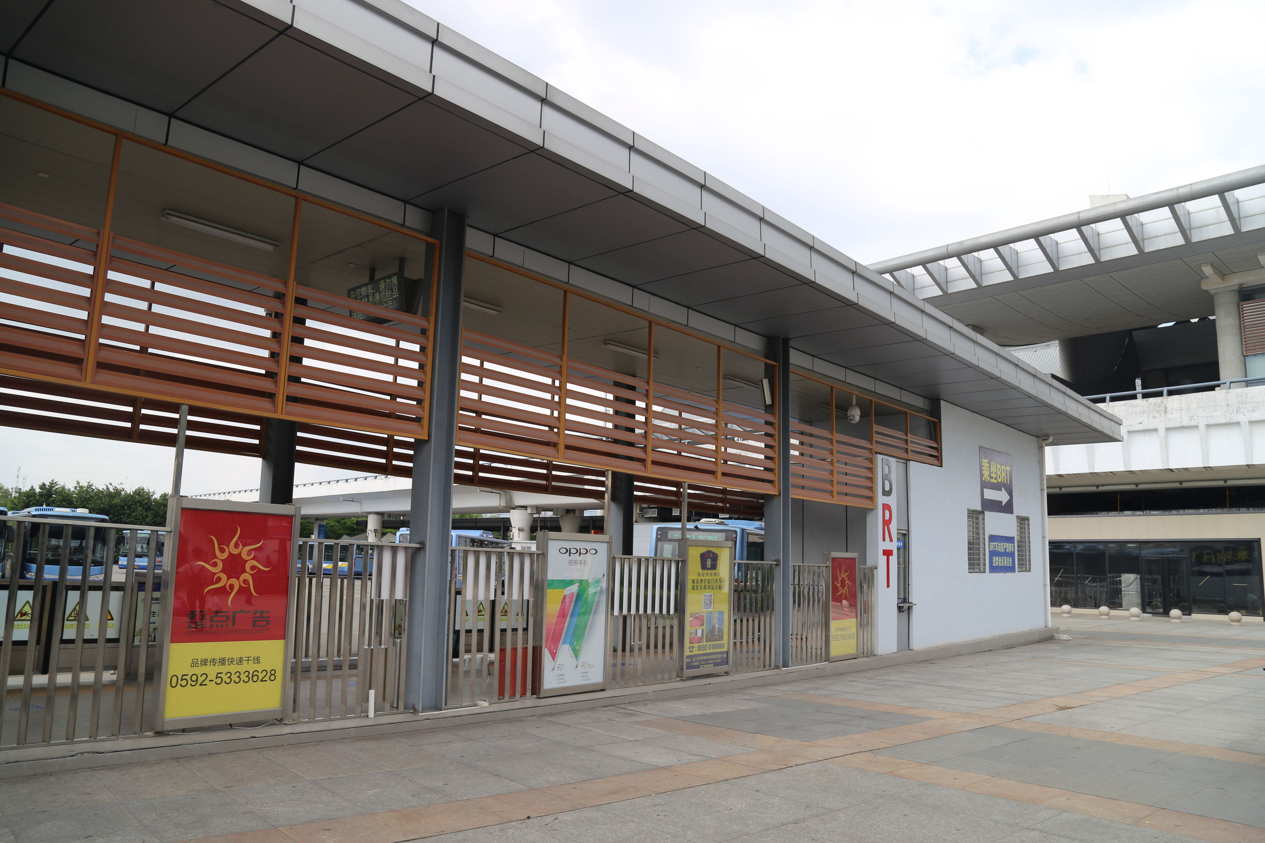 厦门北站BRT车站